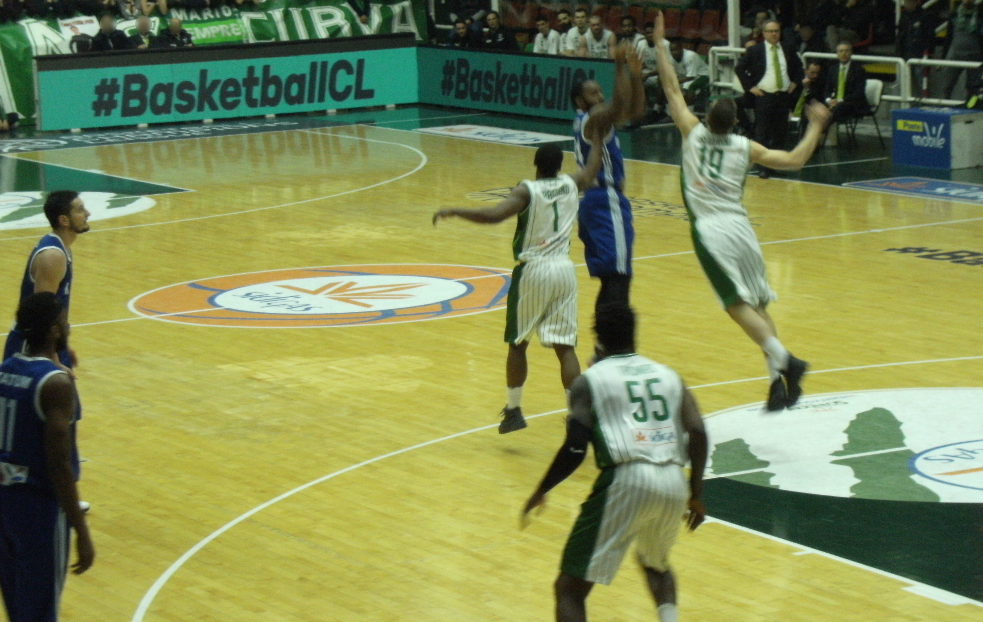 Fase di gioco di Società Sportiva Felice Scandone - Košarkaški klub Mornar Bar (53-60) Palasport Giacomo Del Mauro di Avellino 11/01/2017 Regular Season Basketball Champions League 2016-2017